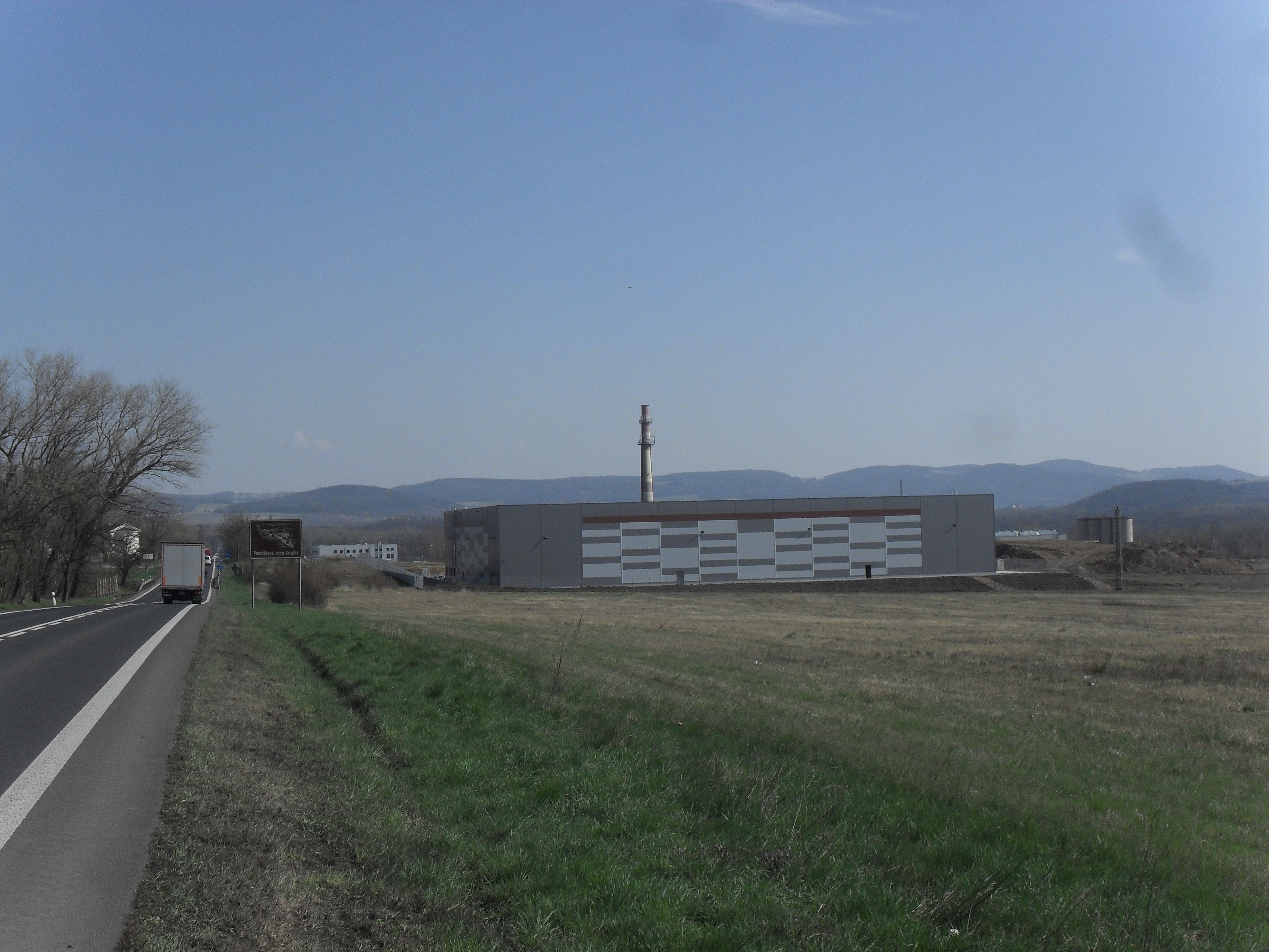 Fabrika Norského koncernu JOTUN u Přestanova.